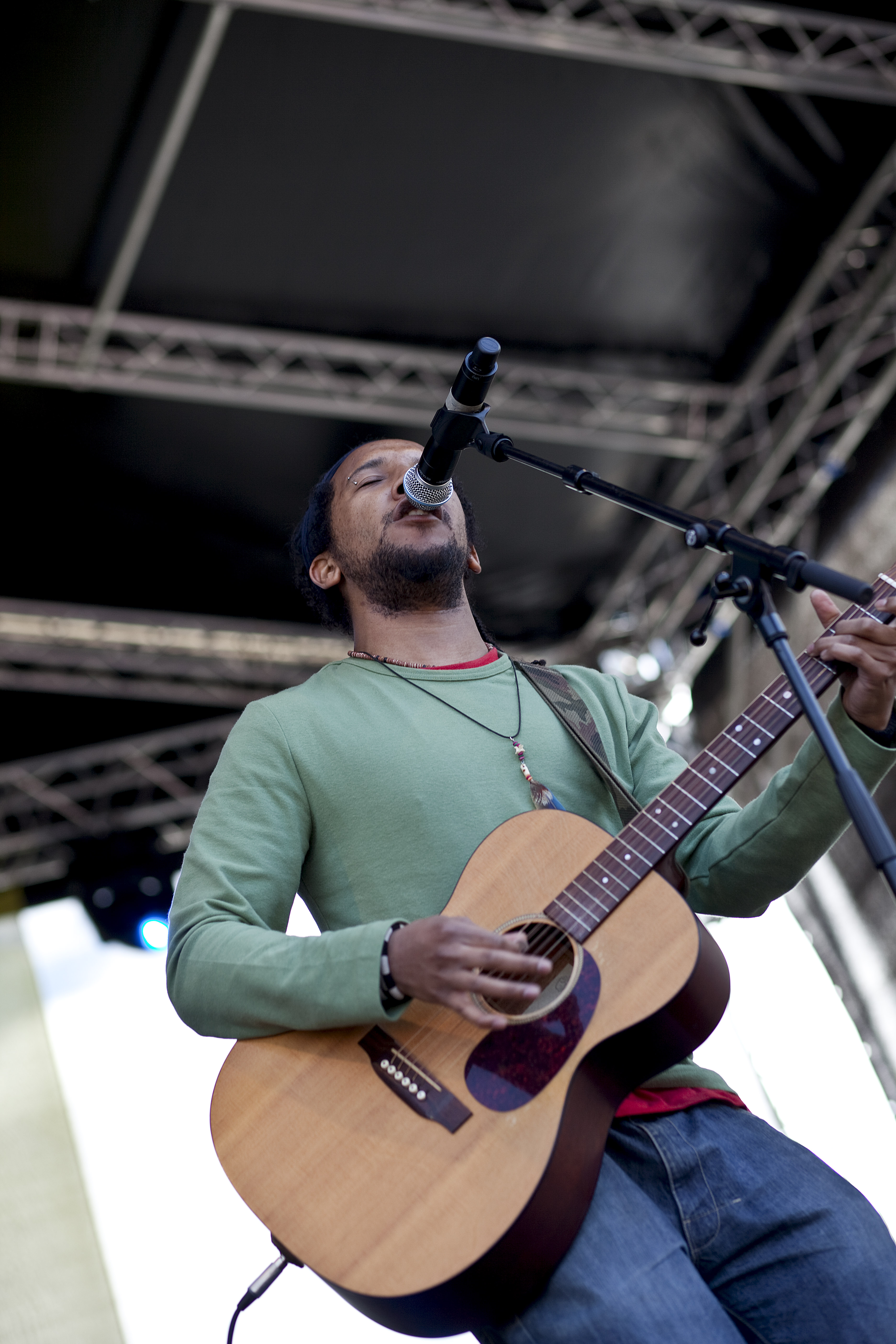 Stig Van Eijk. FOTO: Jarle H. Moe